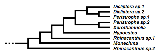 Cladogramma della sottotribù Diclipterinae (Acanthaceae)